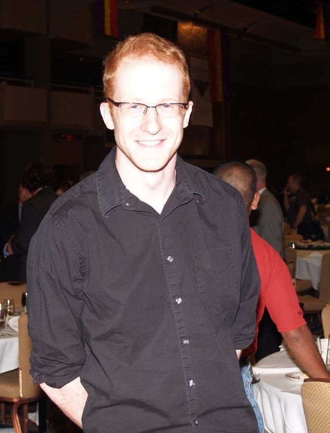 Steve Hofstetter